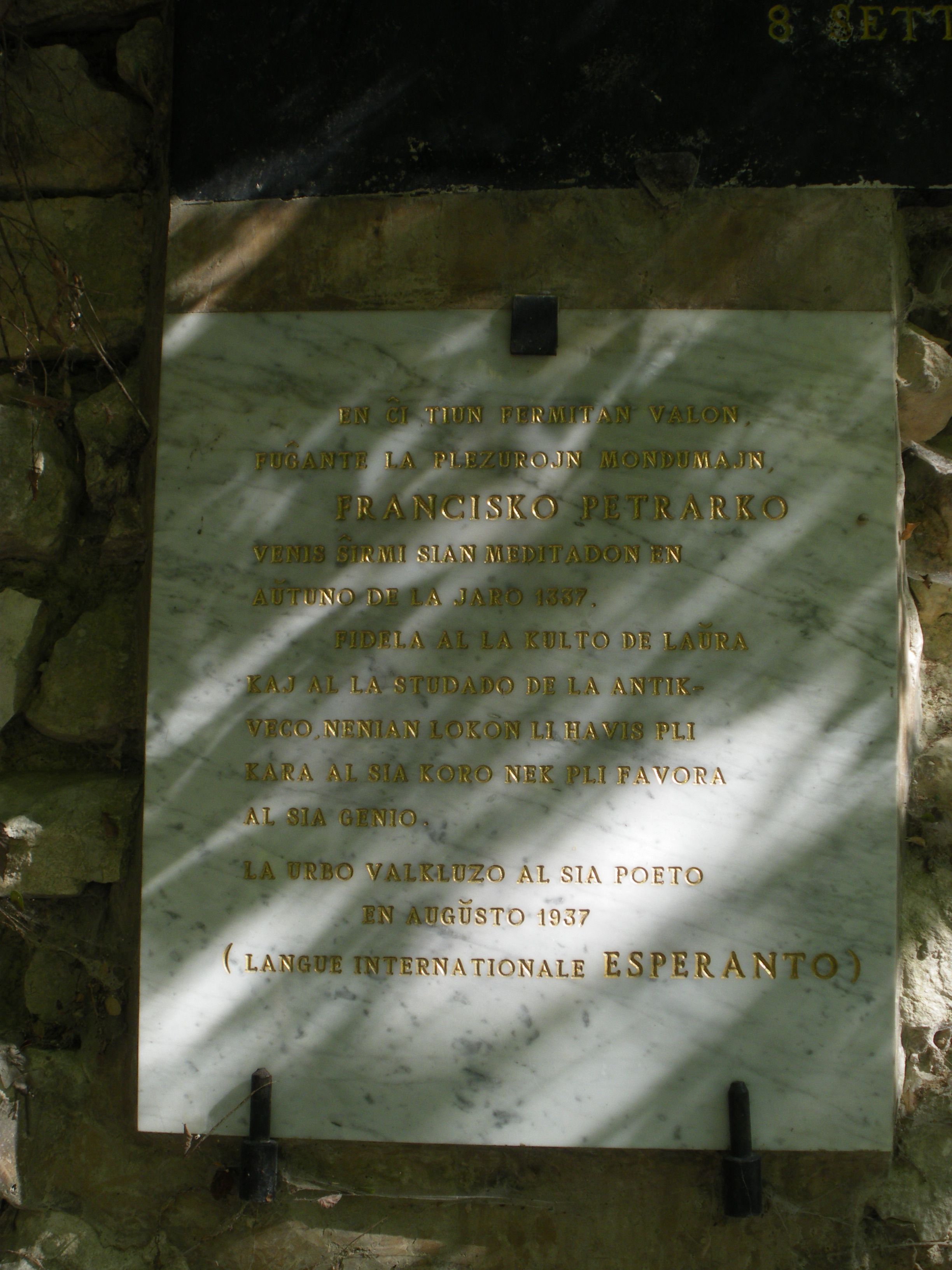 Plaque en mémoire de Pétrarque en Espéranto, Fontaine de Vaucluse, France